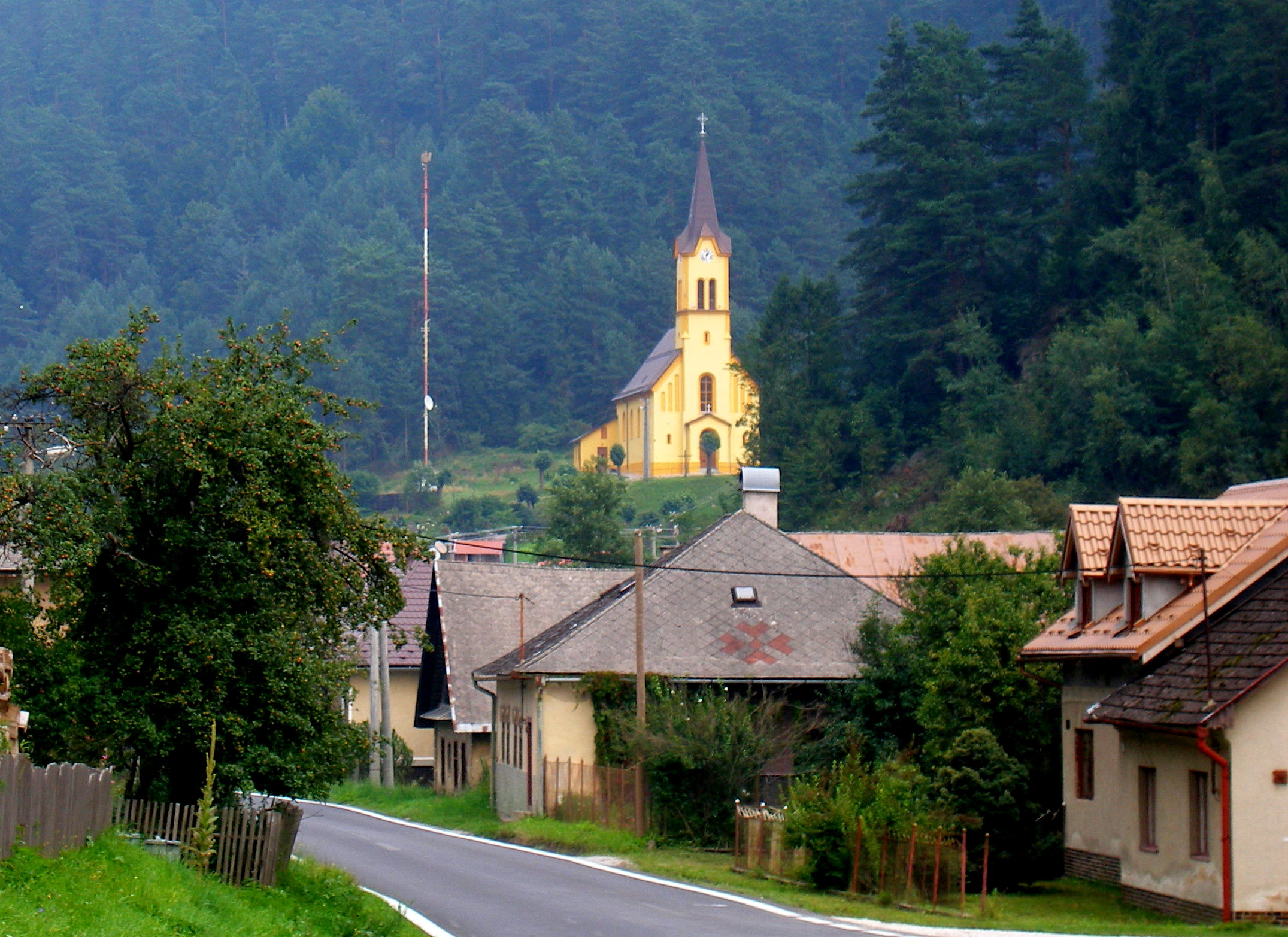 Obec Smolnícka Huta okres Oelnica.